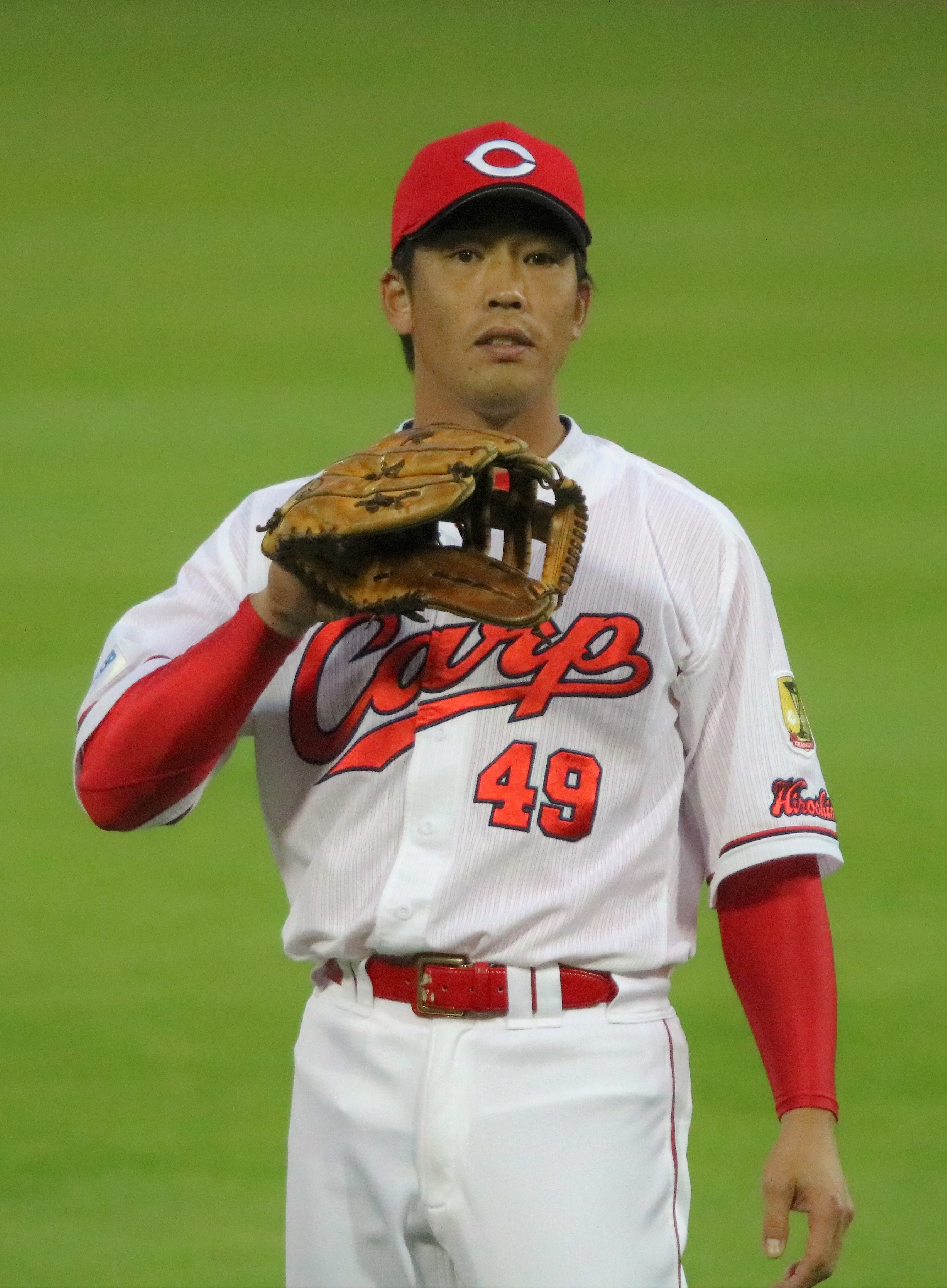 2017年10月24日マツダスタジアム